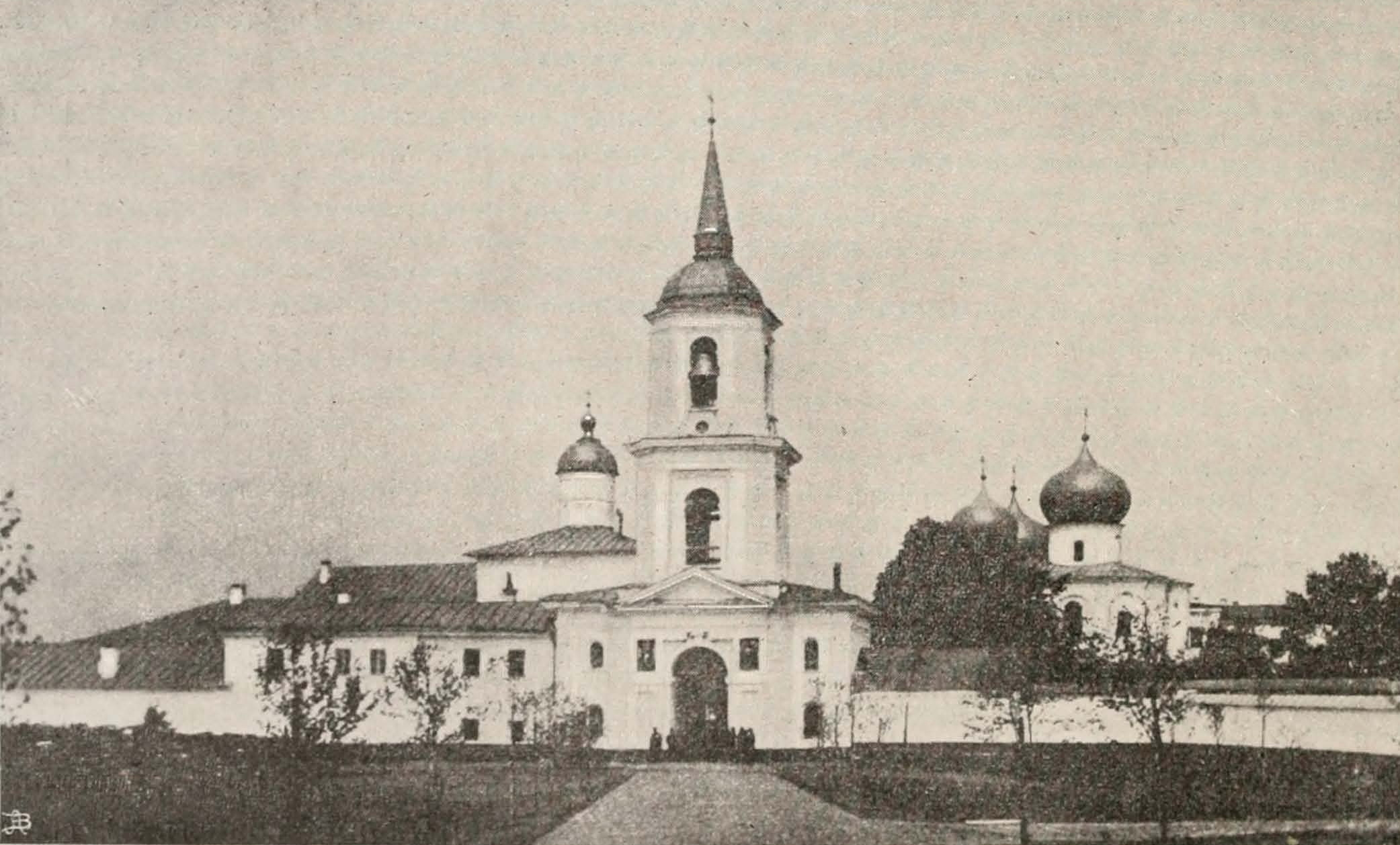 Монастырь Святого Антония Римлянина. Конец XIX века